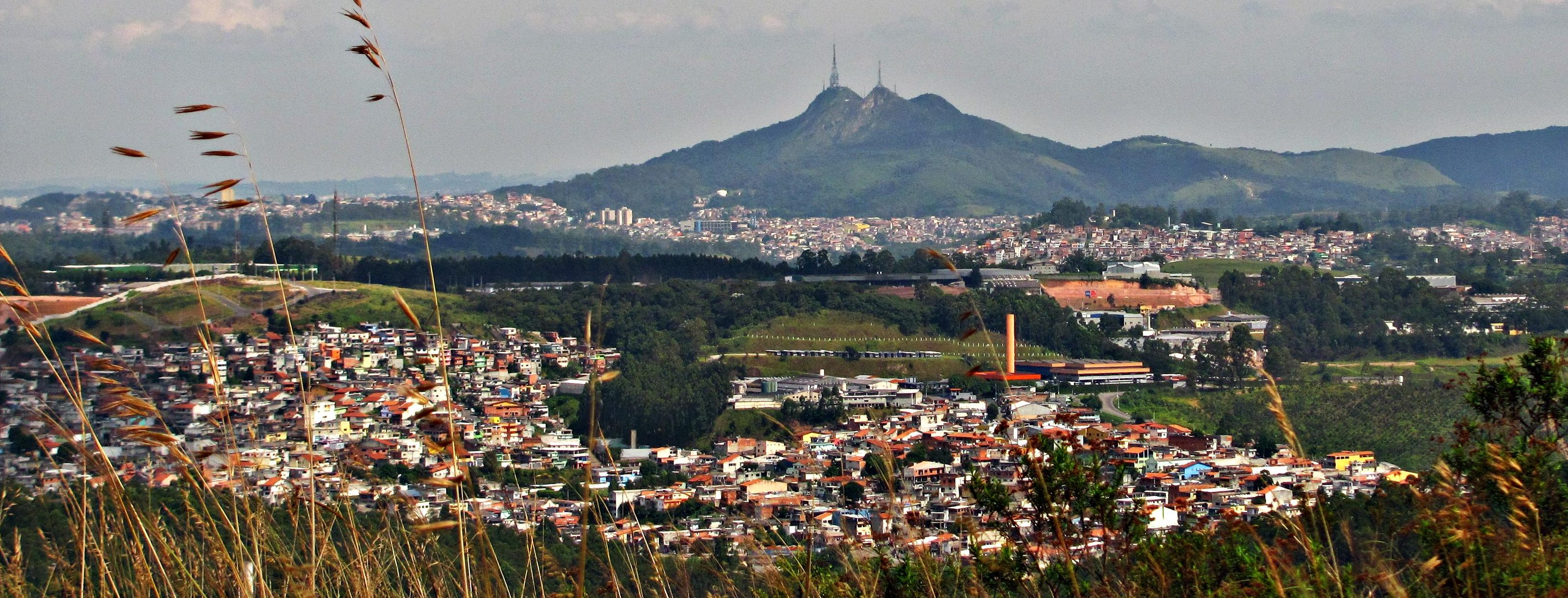 Vista para a parte sul da cidade de Caieiras, com destaque também para o distrito paulistano de Perus e o Pico do Jaraguá.